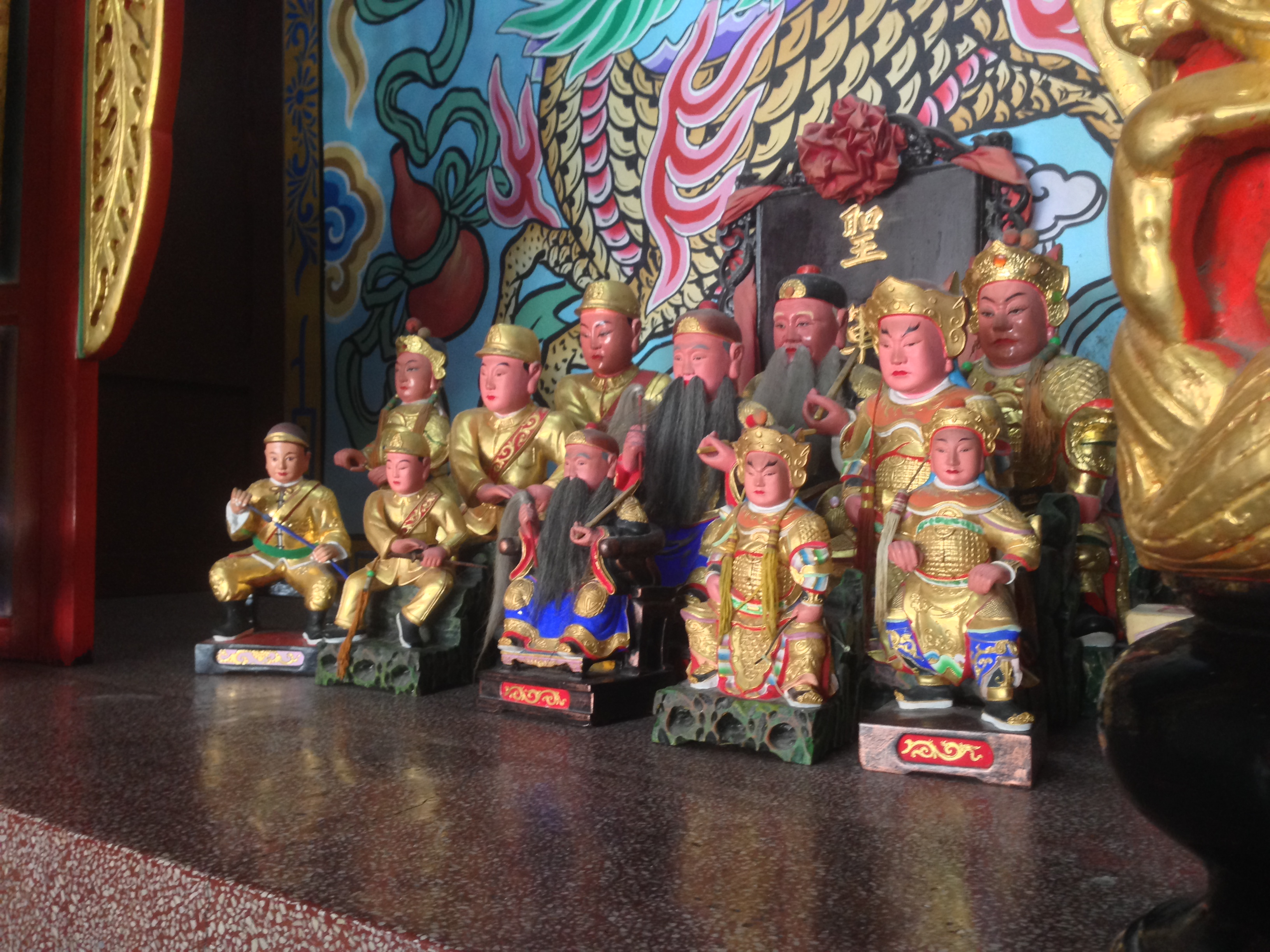 中文（台灣）: 新竹代天府聖軍堂神像